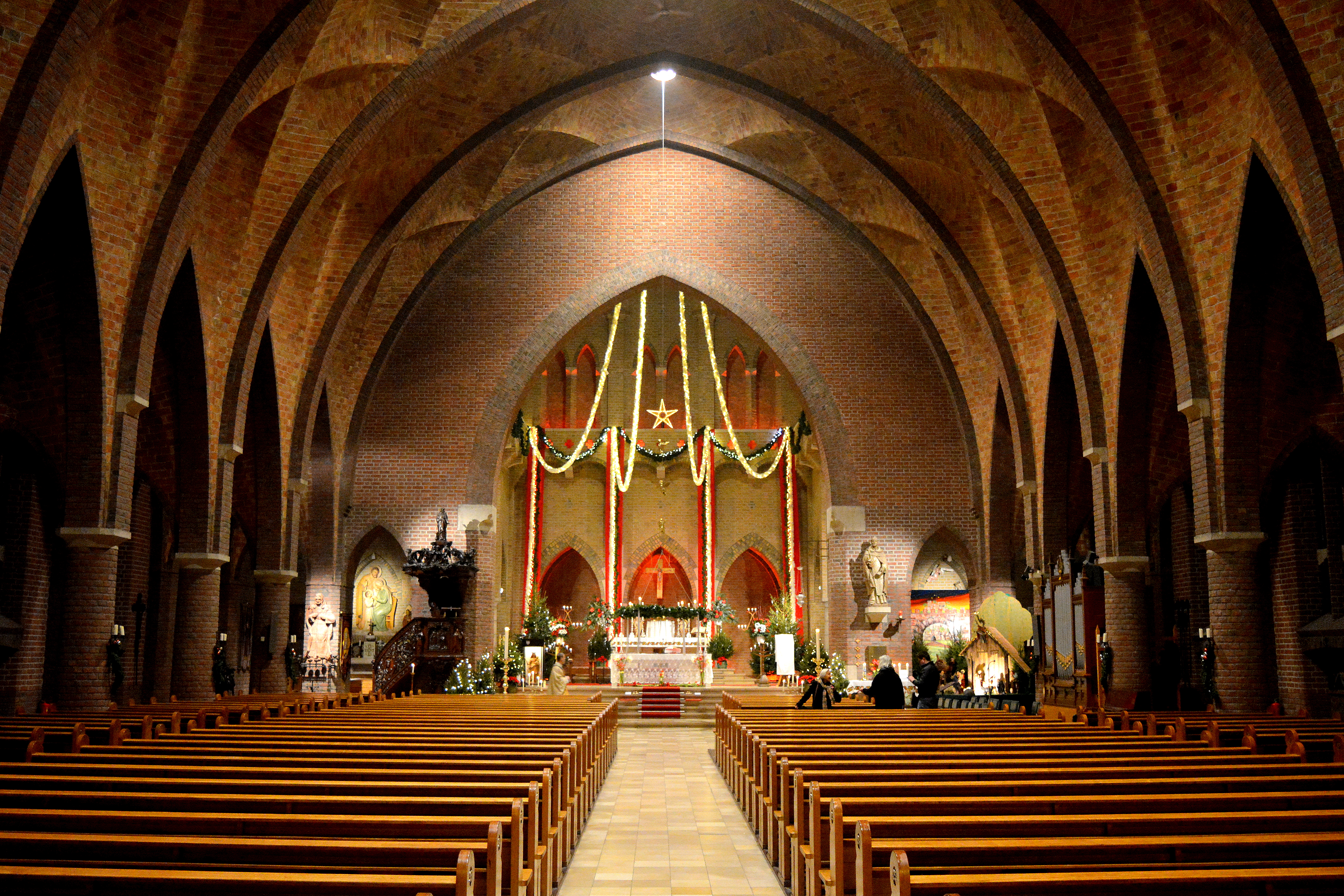 Dominikustsjerke, Ljouwert, ynterieur rjochting koer